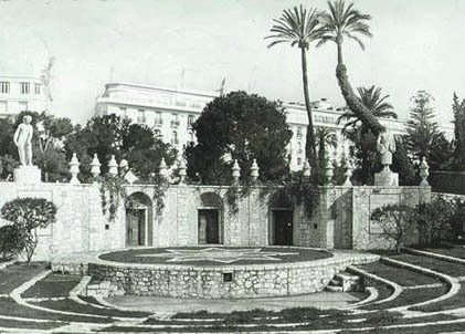 Le théâtre de verdure de Nice en 1947